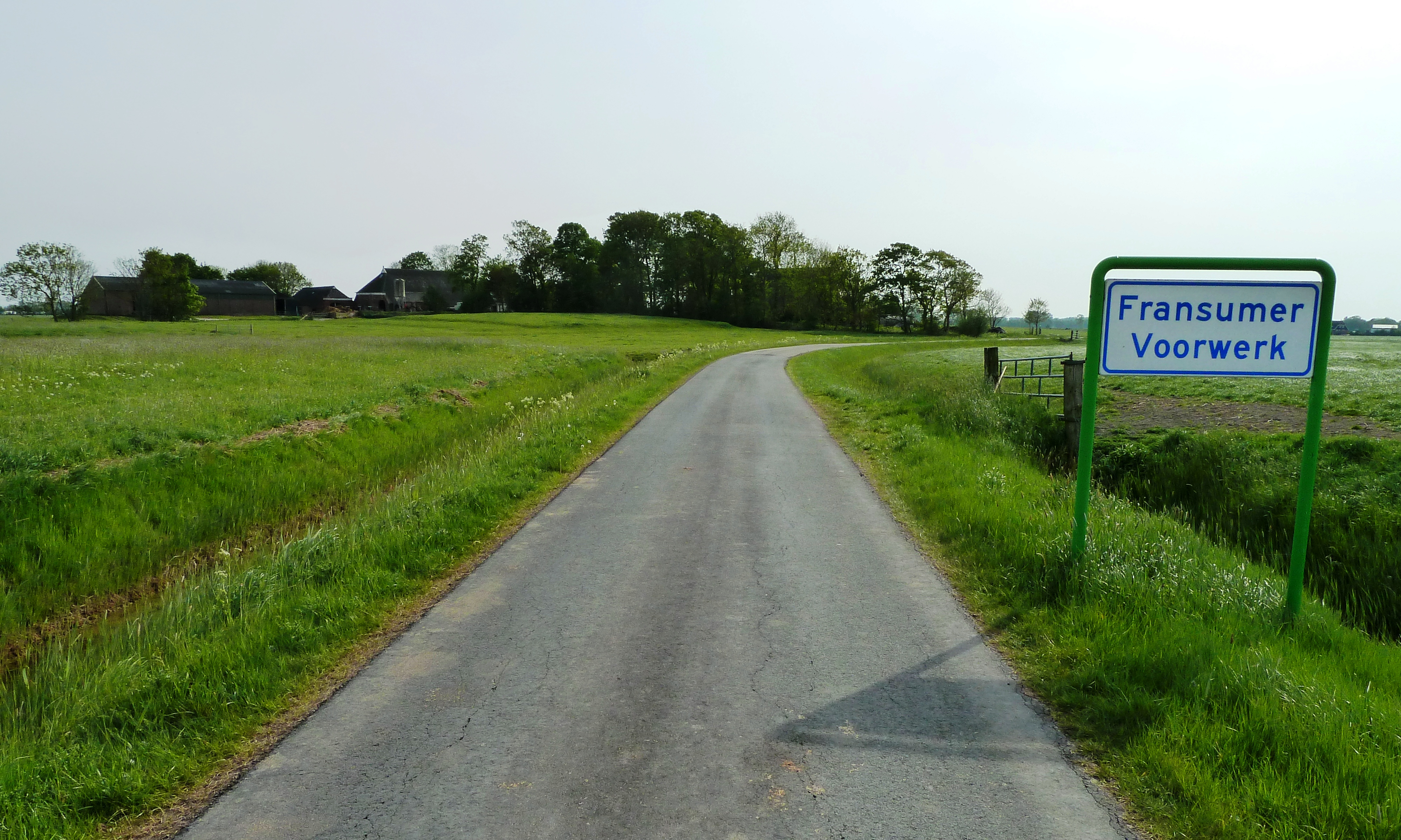 Panorama over de wierde van het Fransumer Voorwerk (Zuidhorn, Groningen, Nederland)